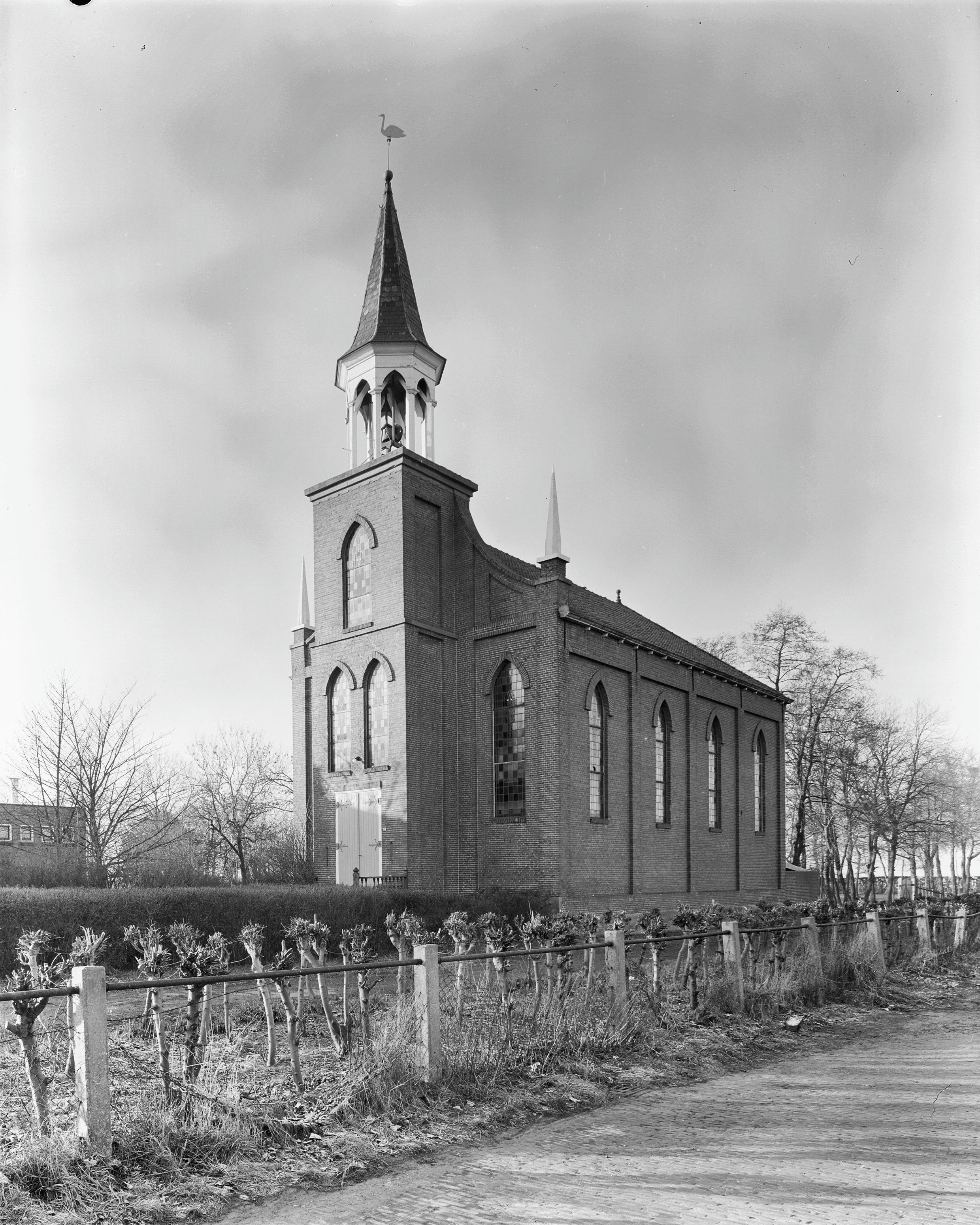 Lutherse Kerk: noord-west zijde exterieur